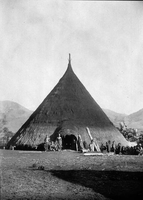 Foto. Manggarai woonhuis